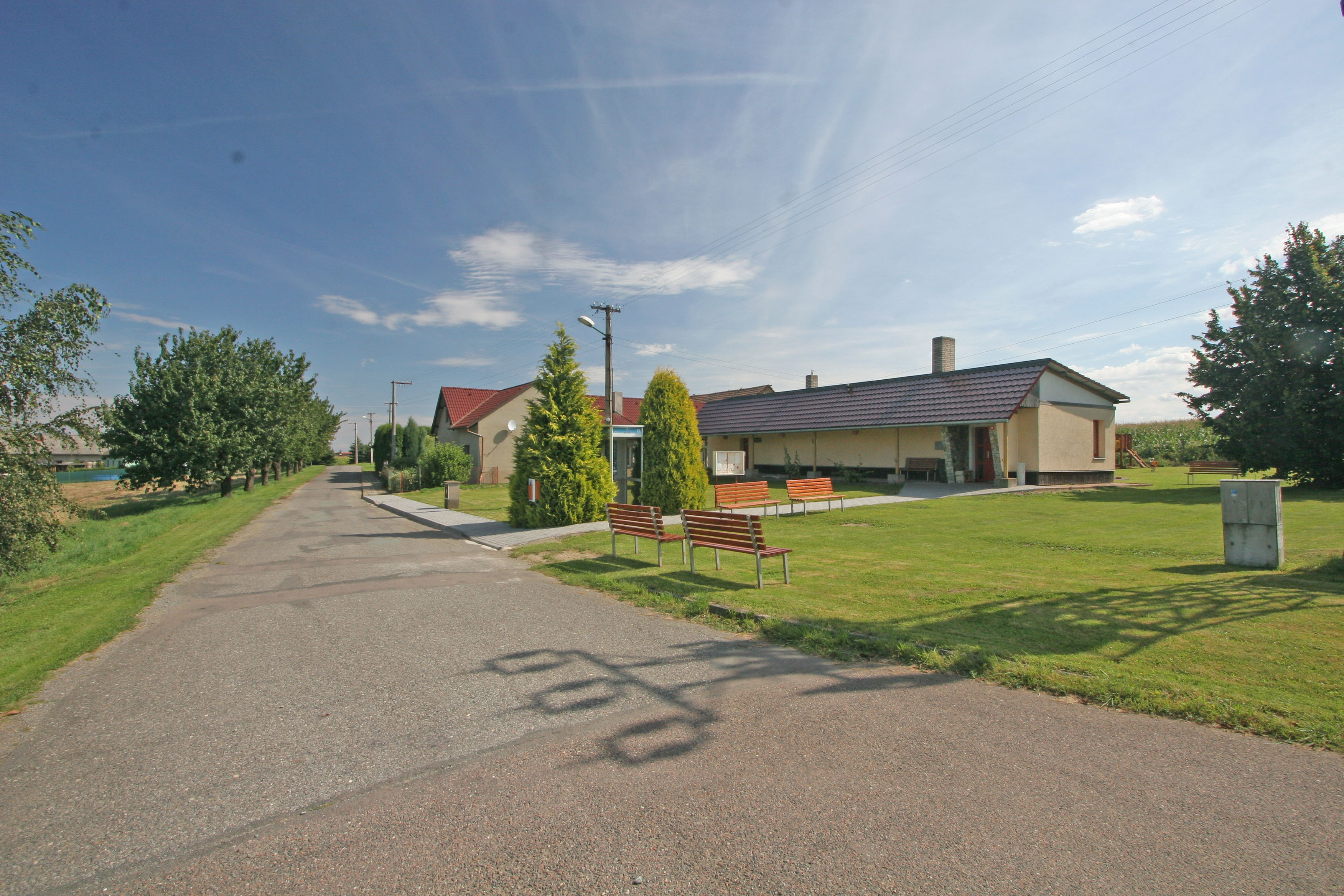 Holotín obecní úřad